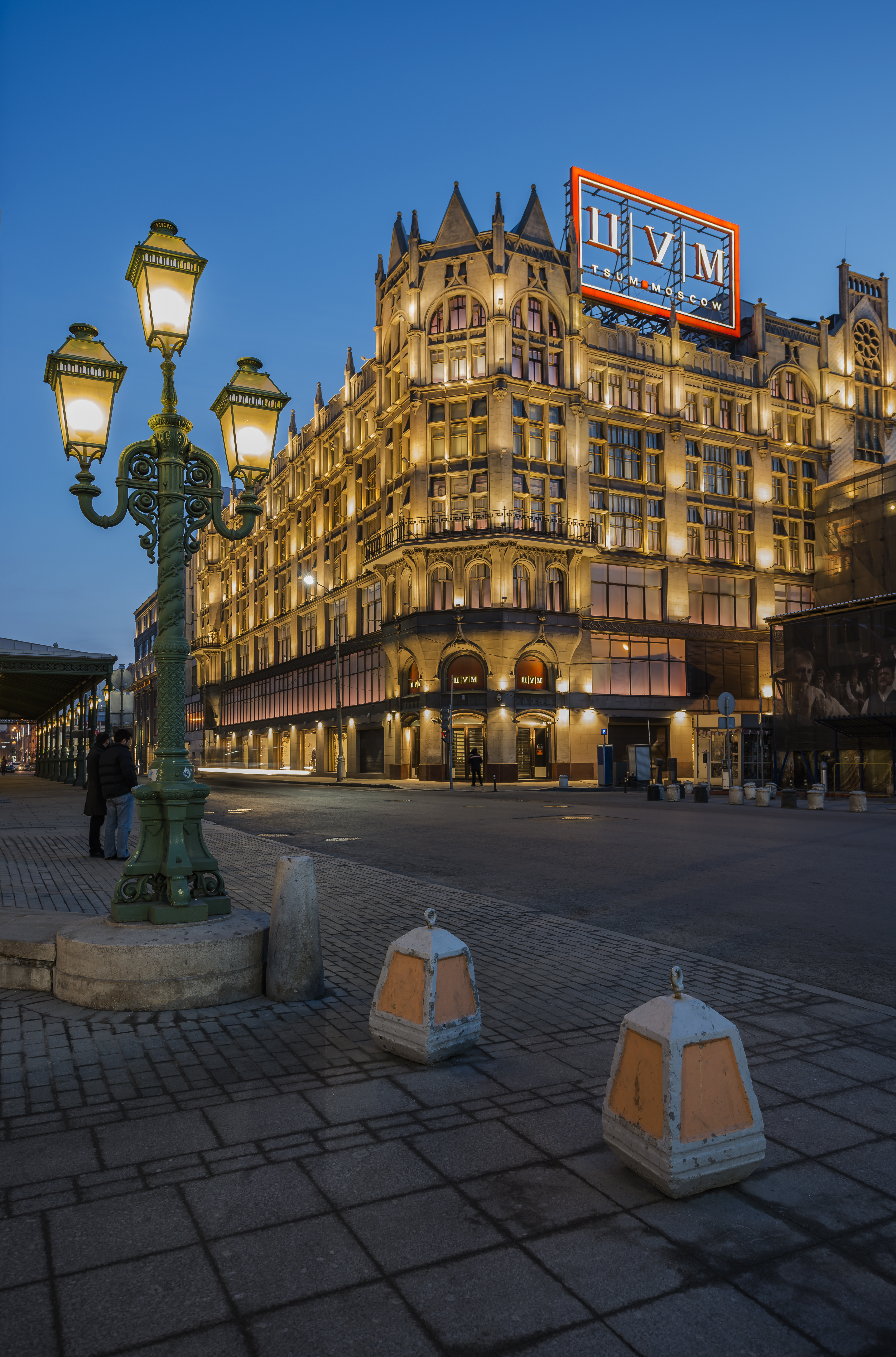 Универсальный магазин Мюр и Мерилиз: Петровка ул., дом 2, строение 1, Тверской, Центральный округ, Москва